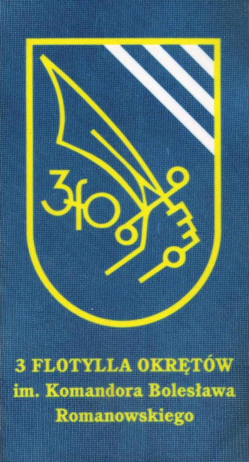 Proporczyk 3 Flotylli Okrętów (awers).